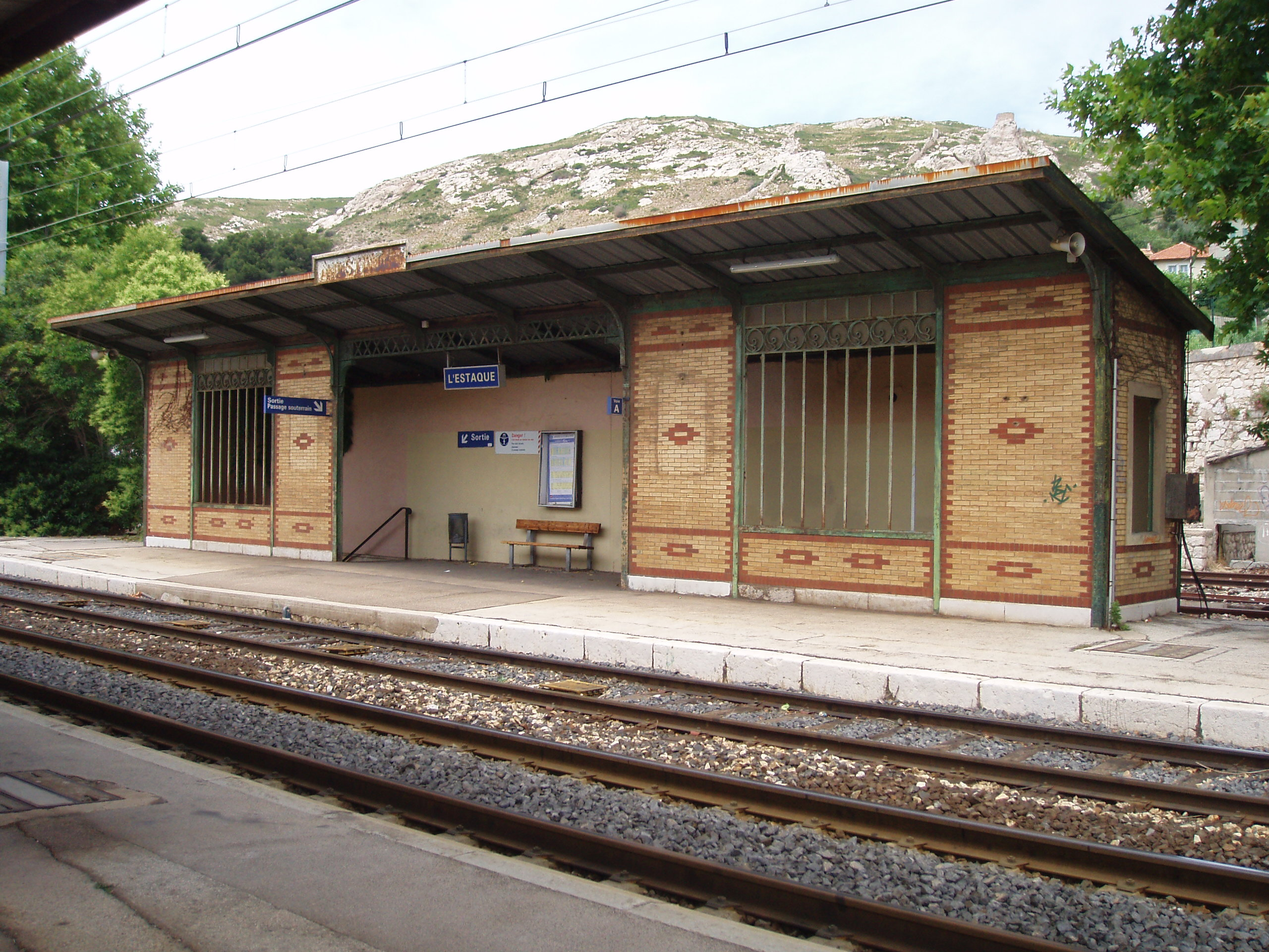 Gare de l'Estaque (Marseille, France) voie A. Le bâtiment principal se trouve de l'autre côté.